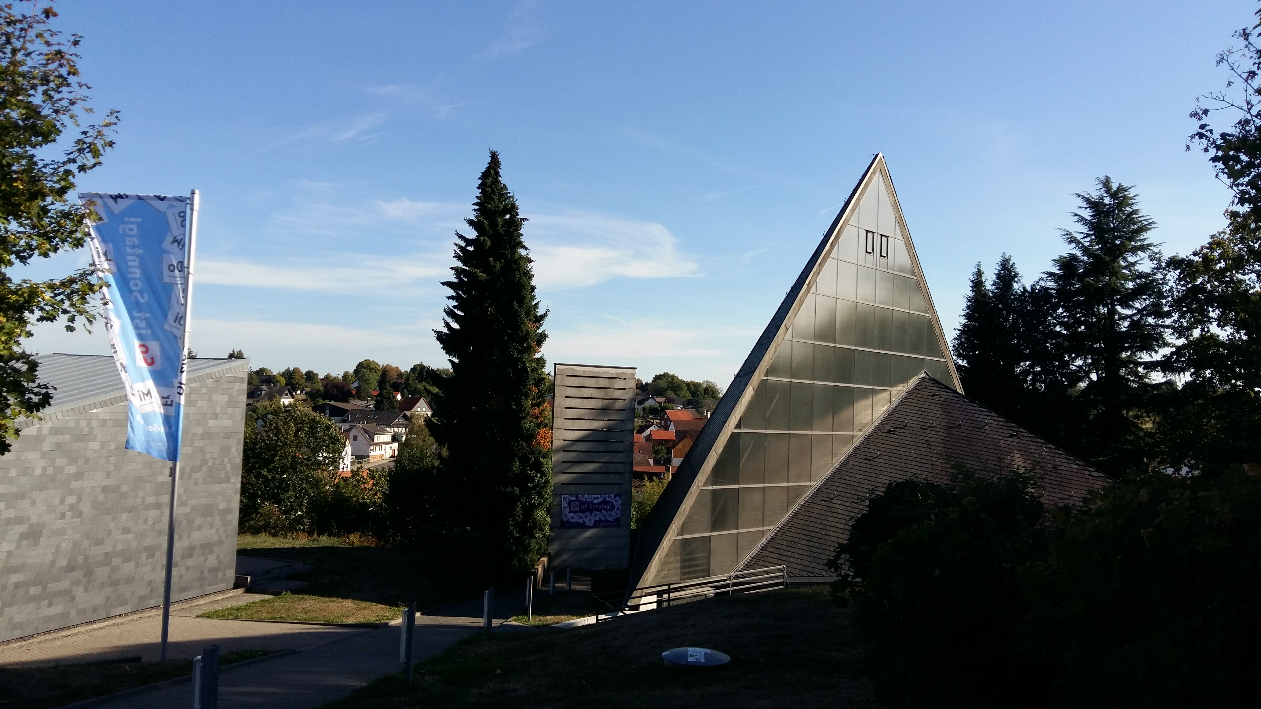 Evangelische Kirche in Höchst-Hassenroth von Norden (September 2018].